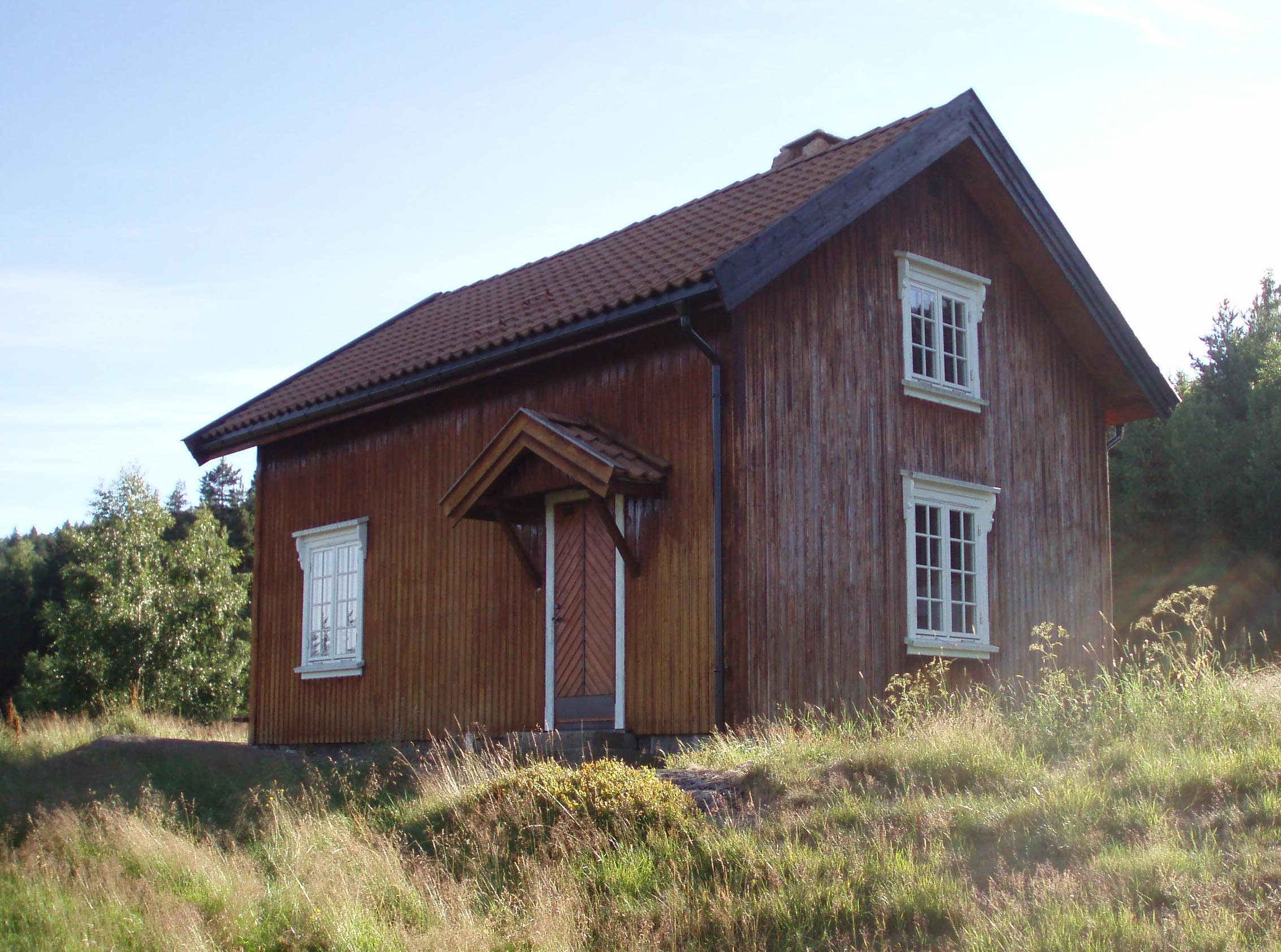 Eldhus